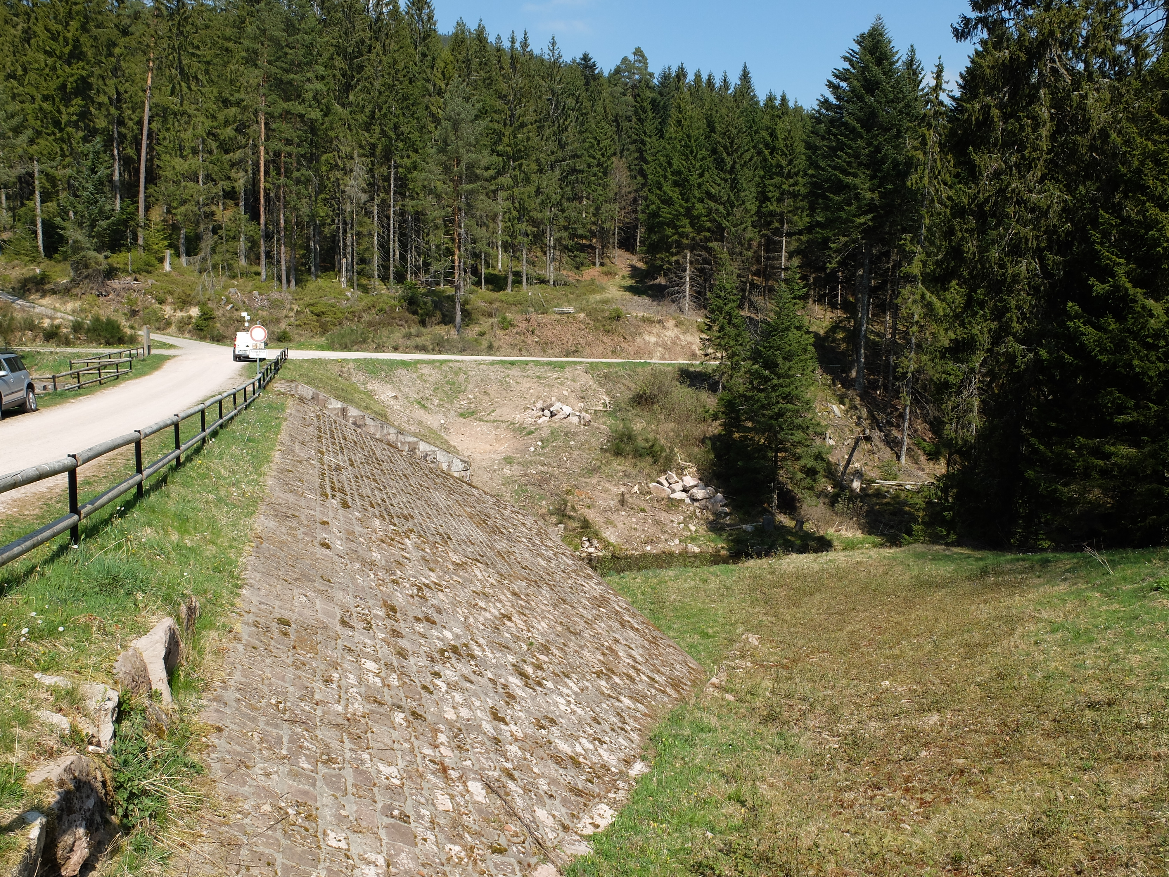 Herrenwieser Schwallung bei Forbach im Nordschwarzwald